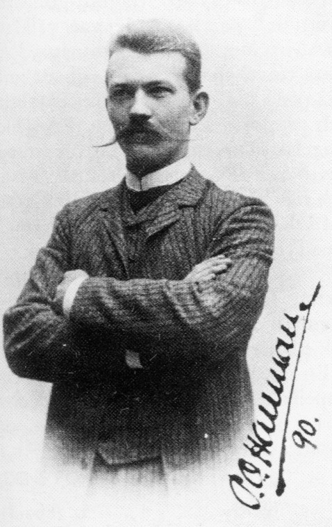 Stadsplanearkitekt Per Olof Hallman